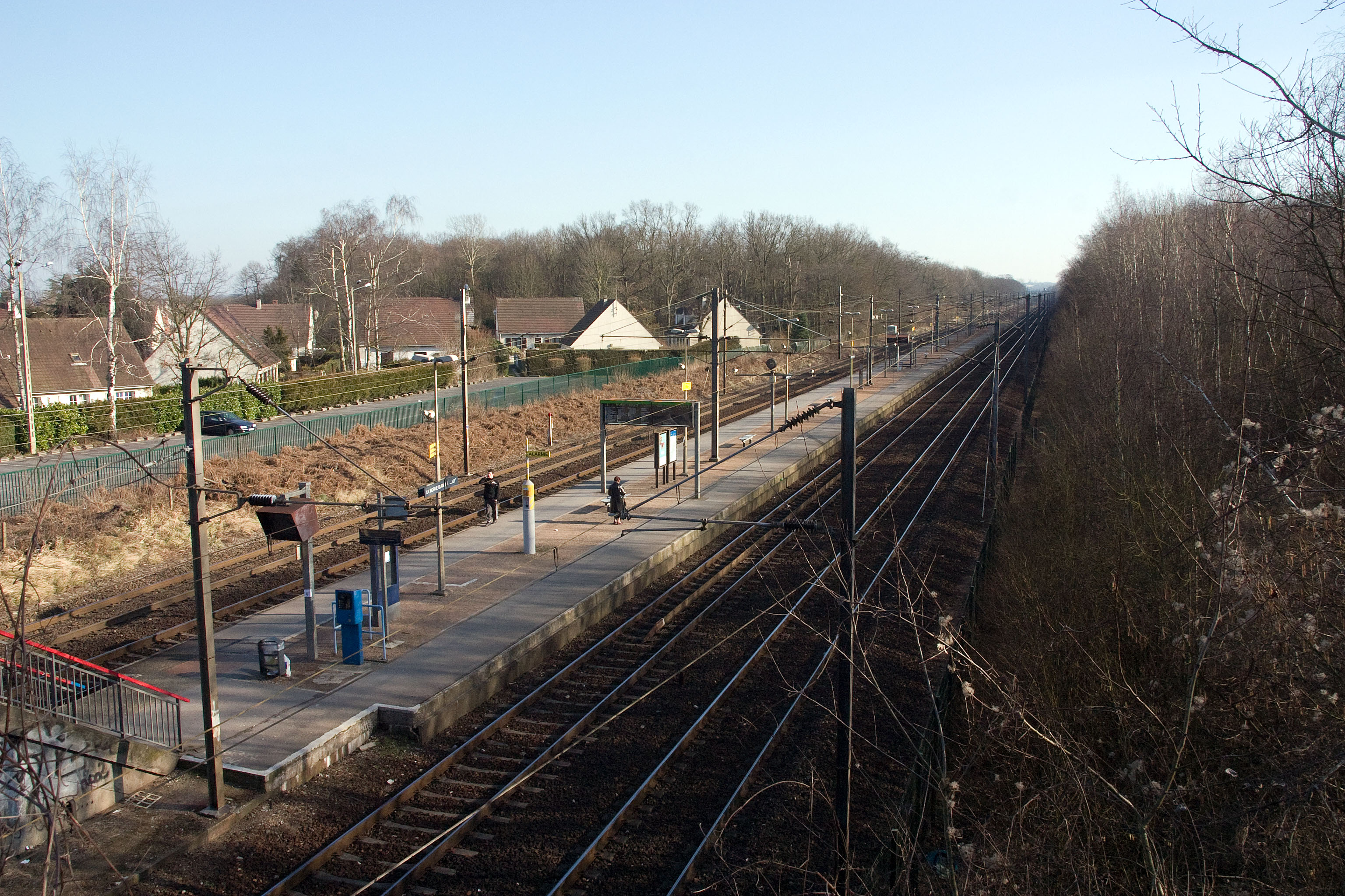 Gare de La Borne Blanche - Orry-la-Ville, département de l'Oise (France)